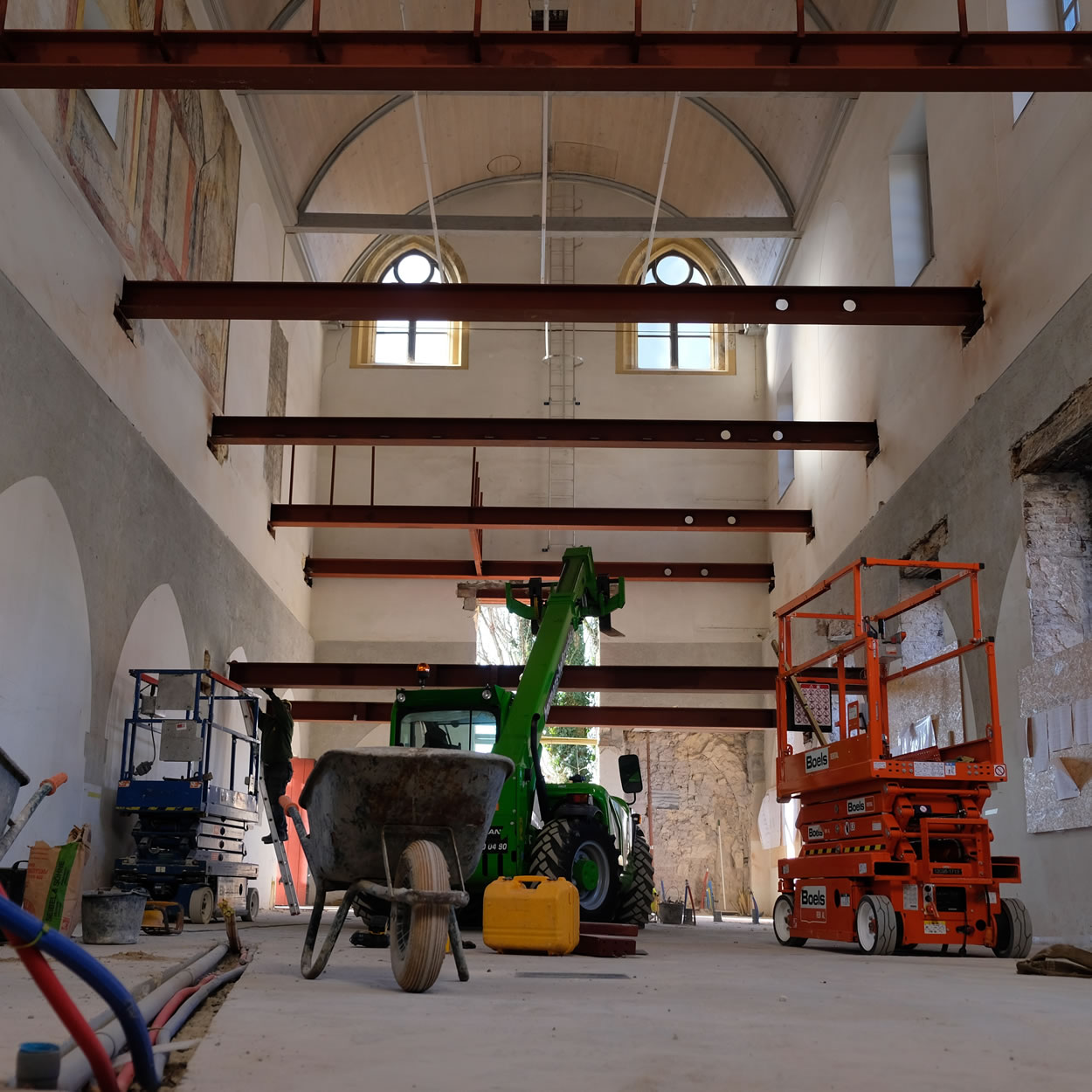 Geplaatste draagbalken voor de zwevende elementen in de Andrieskapel te Maastricht